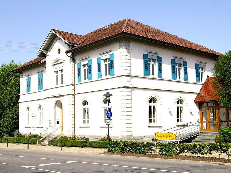 Das ehemalige Schulgebäude von Weildorf. Rechts das anschließende DGH.